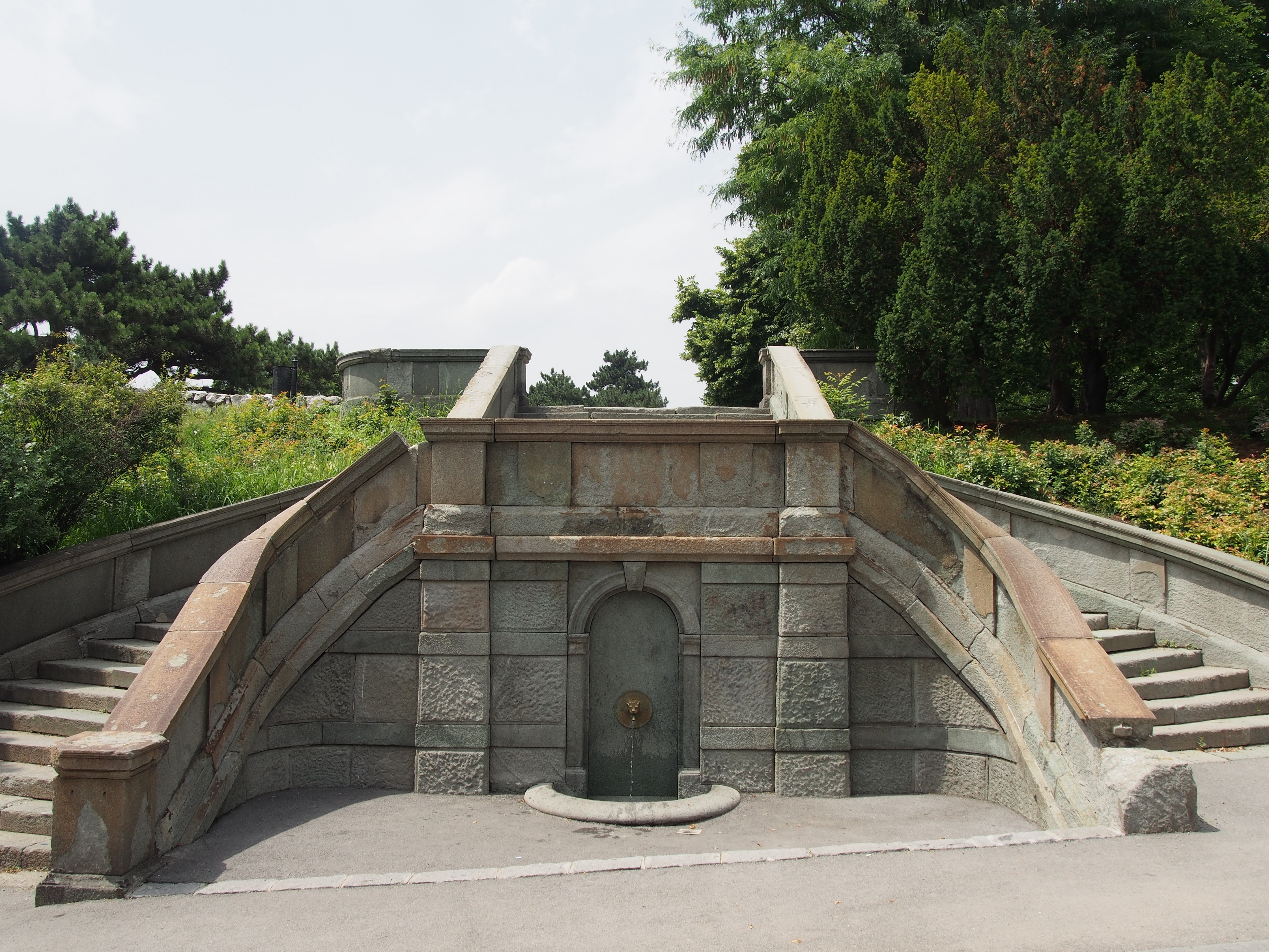 Kalemegdan